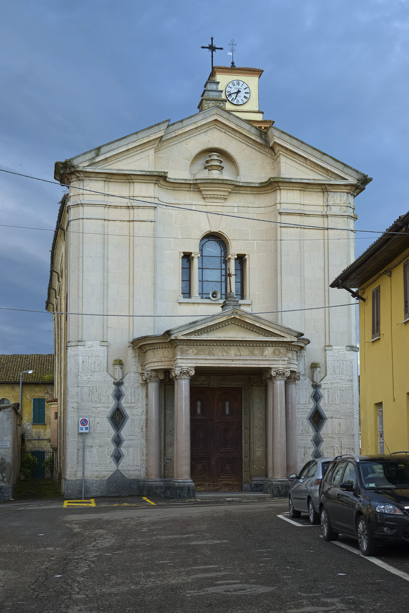 Chiesa di San Bernardo